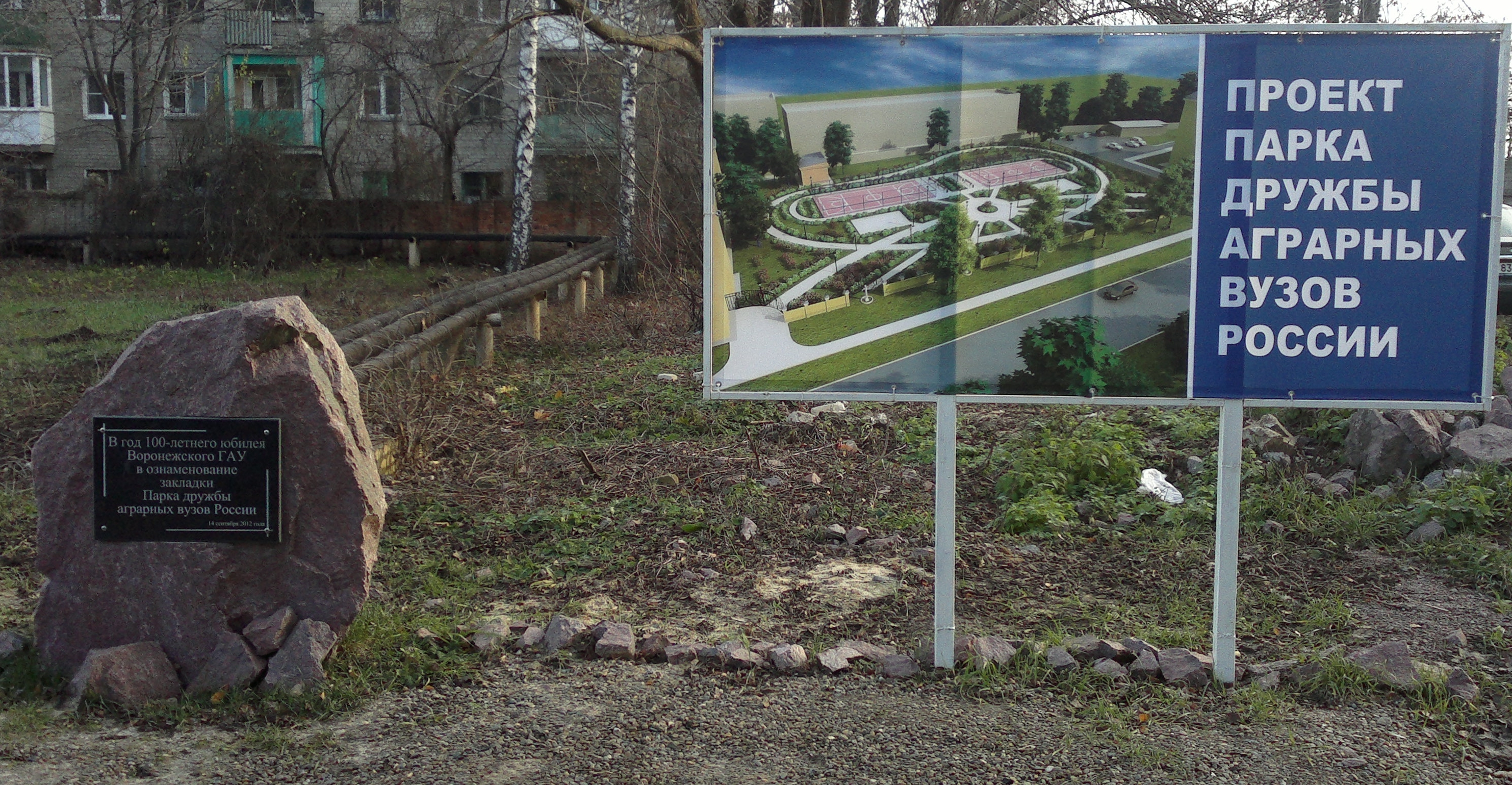 фото сделано 22 ноября 2012 года